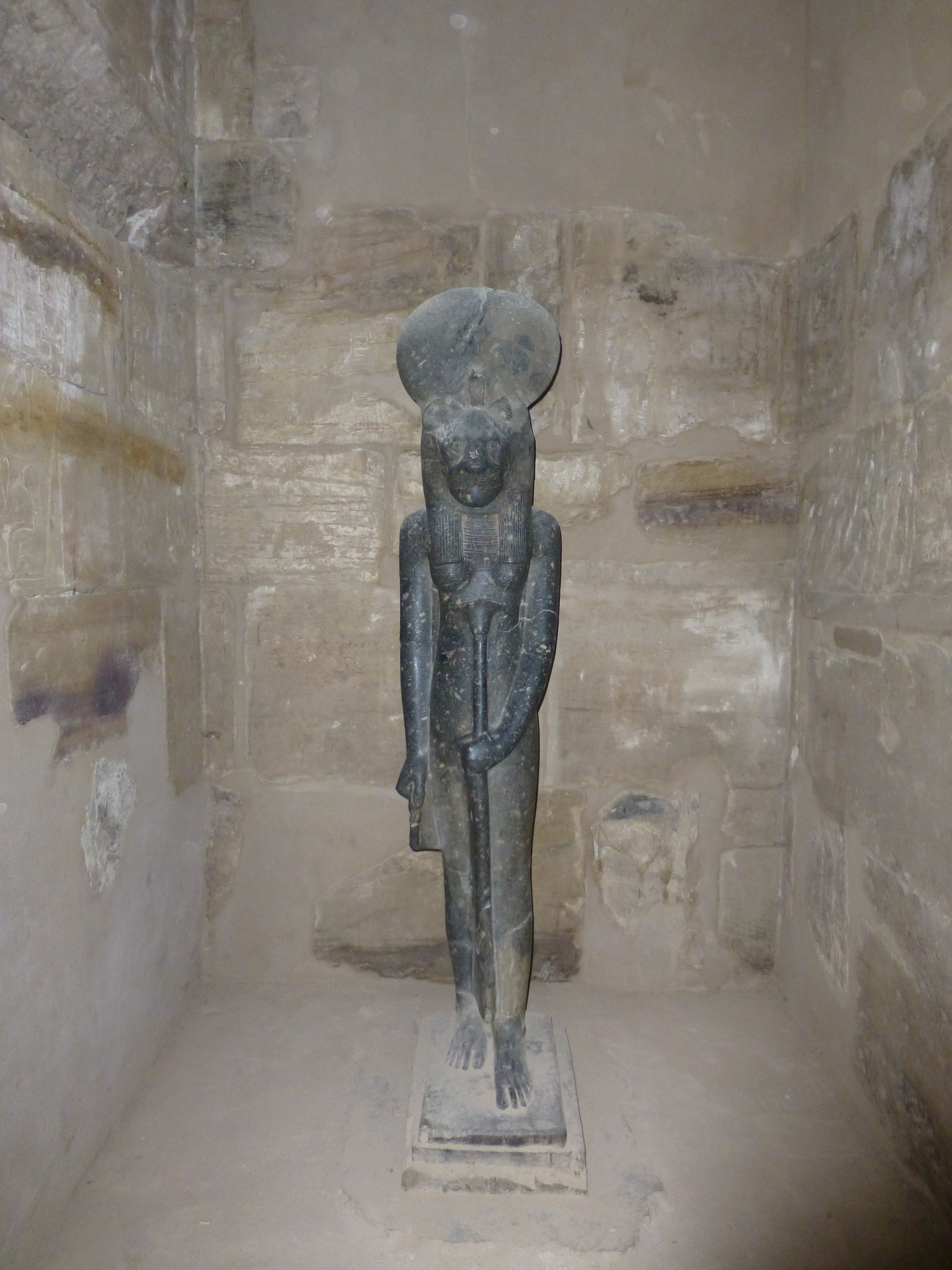 Egyptische godin Moet in kleine tempel Karnak